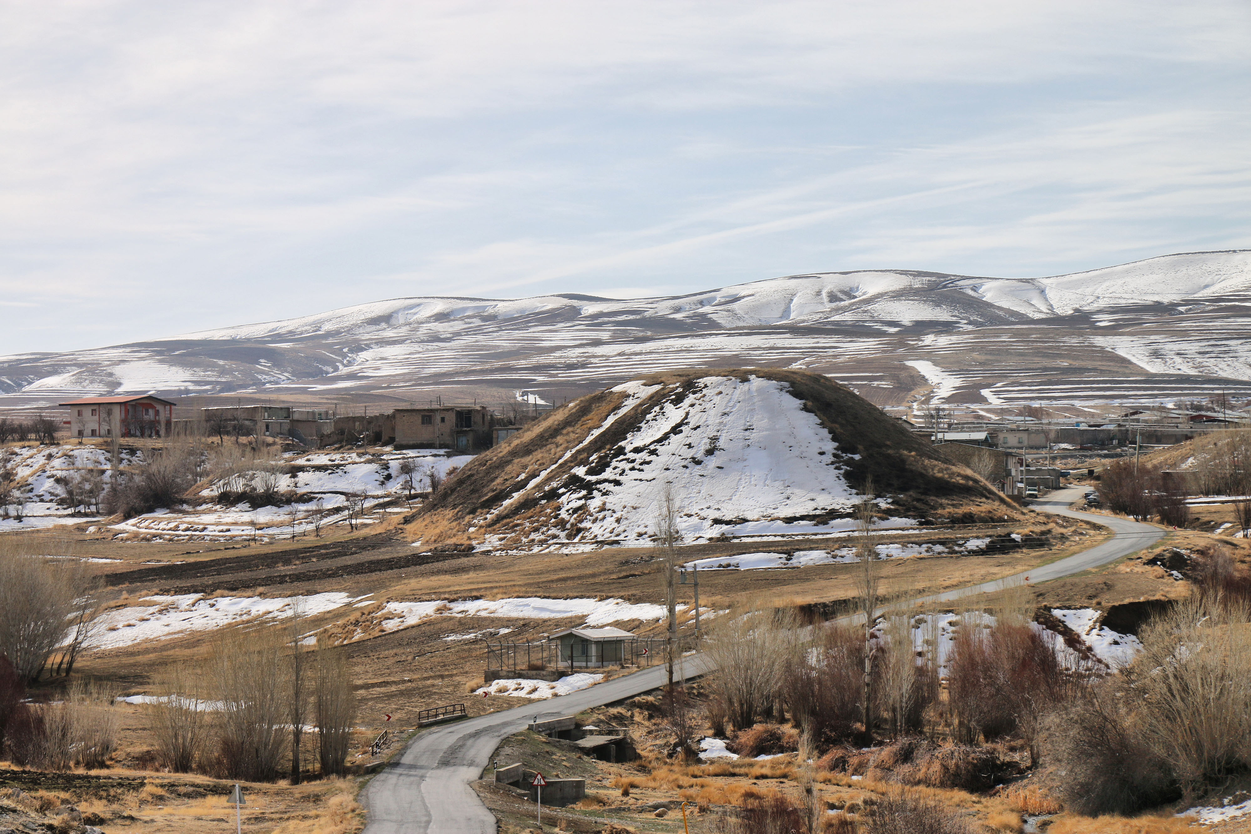 تپه باستانی گور دراز/ نجف‌آباد